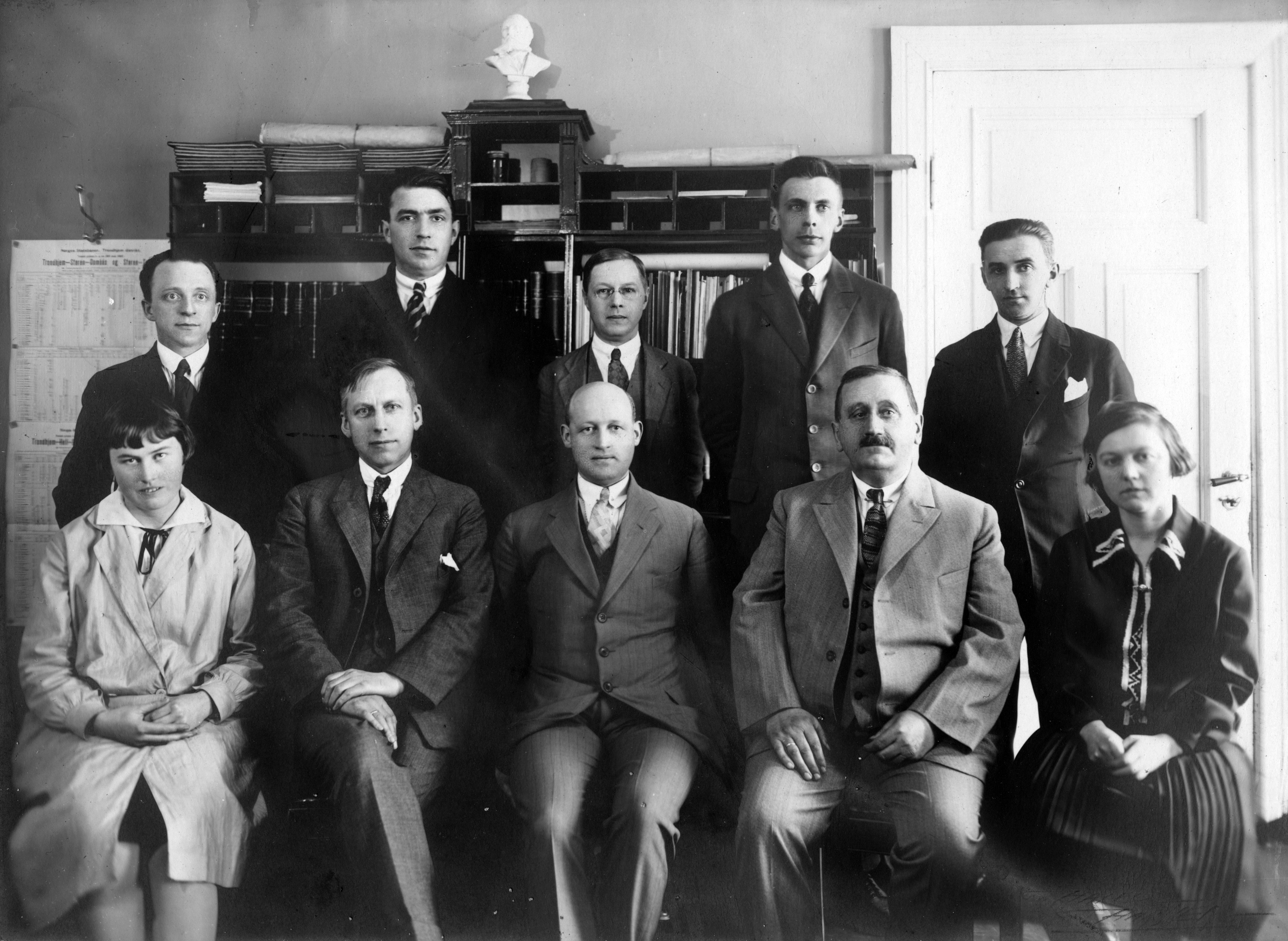 Format: Fotopositiv Dato / Date: 1927 Fotograf / Photographer: Eirik Sundvor (1902 - 1992) Sted / Place: Trondheim Wikipedia: Nidaros (avis) Eier / Owner Institution: Trondheim byarkiv, The Municipal Archives of Trondheim Arkivreferanse / Archive reference: Tor.H40.B12.F0682 [T0758] Merknad: Fra avisa Nidaros' 25 års-jubileum, juni 1927. Nidaros hadde sin opprinnelse i avisen Dagsposten i Trondhjem. Da eierne av Dagsposten syntes redaktøren ble for radikal, tok redaktør Håkon Løken (1859 - 1923) like godt med seg alle medarbeiderne og opprettet den nye avisen Nidaros i 1902. Avisen hadde sine lokaler i Søndre gate 8 i 1925. Nidaros var en stor og viktig avis i Trondhjem fra 1902 og fram til 1929. I 1929 fikk nemlig avisen en alvorlig bredside fra byens befolkning som den aldri helt skulle klare å komme seg igjen etter. Byens befolkning vendte avisen ryggen da redaksjonen valgte å kjempe for navneforandringen av byens navn fra "Trondhjem" til "Nidaros". Resultatet ble at byens innbyggere boikottet avisen, som dermed mistet både abonnenter og annonseinntekter. Avisas fotograf Eirik Sundvor nr. 4 fra v. bak.